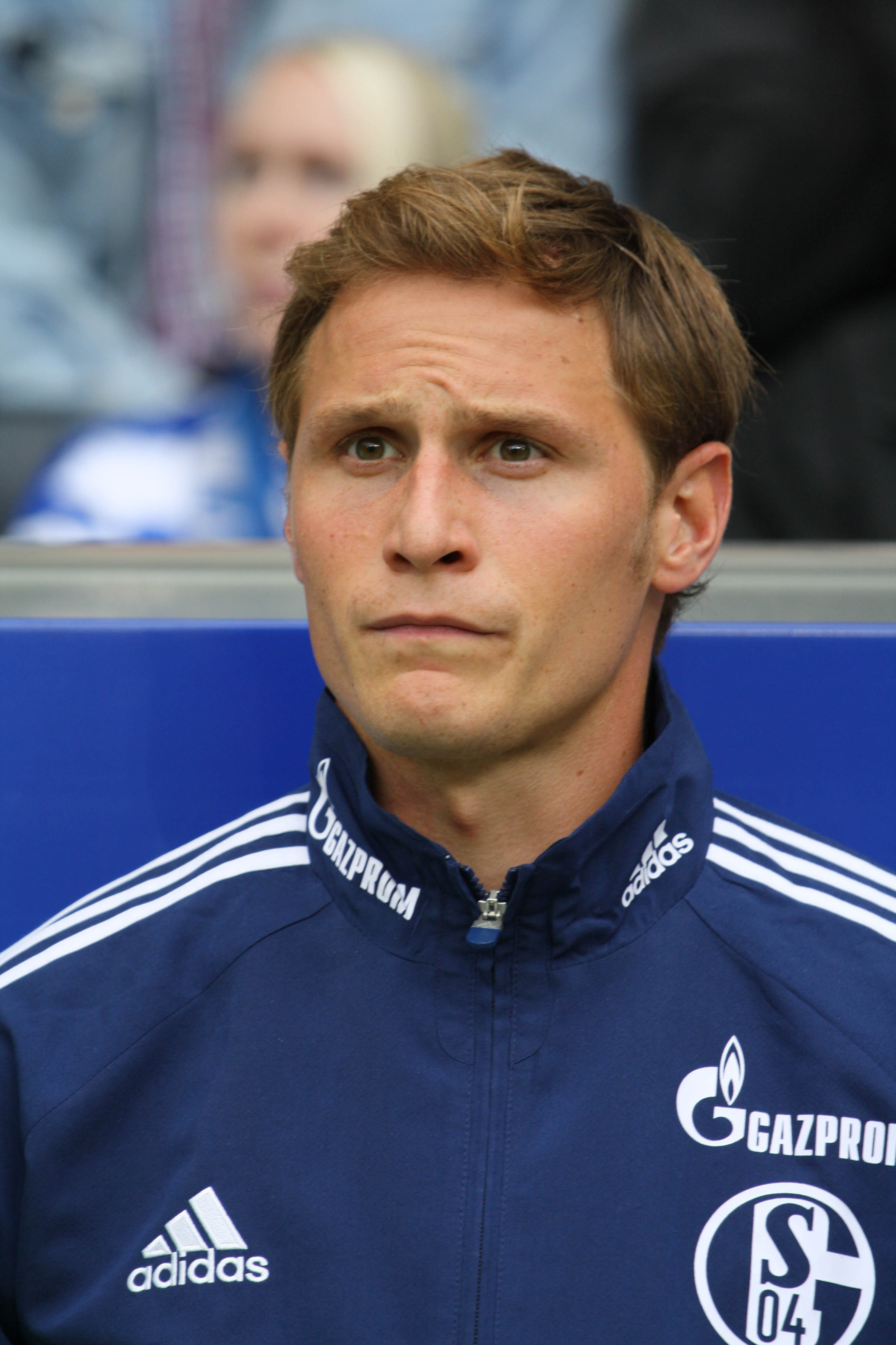 Benedikt Höwedes